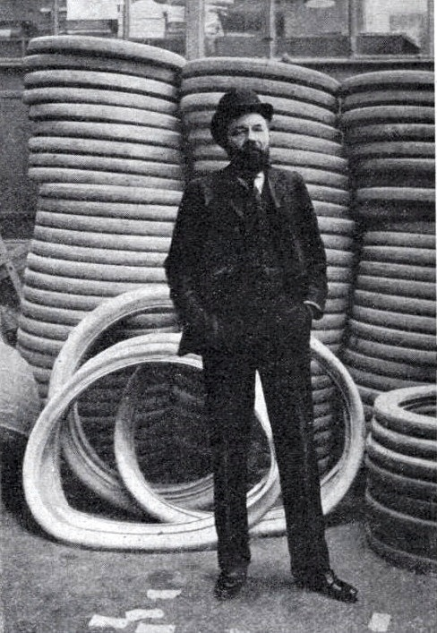 André Michelin et ses pneumatiques (1904) - La Vie au Grand Air du 24 novembre 1904, p.952 (membre de la commission exécutive Gordon Bennett)